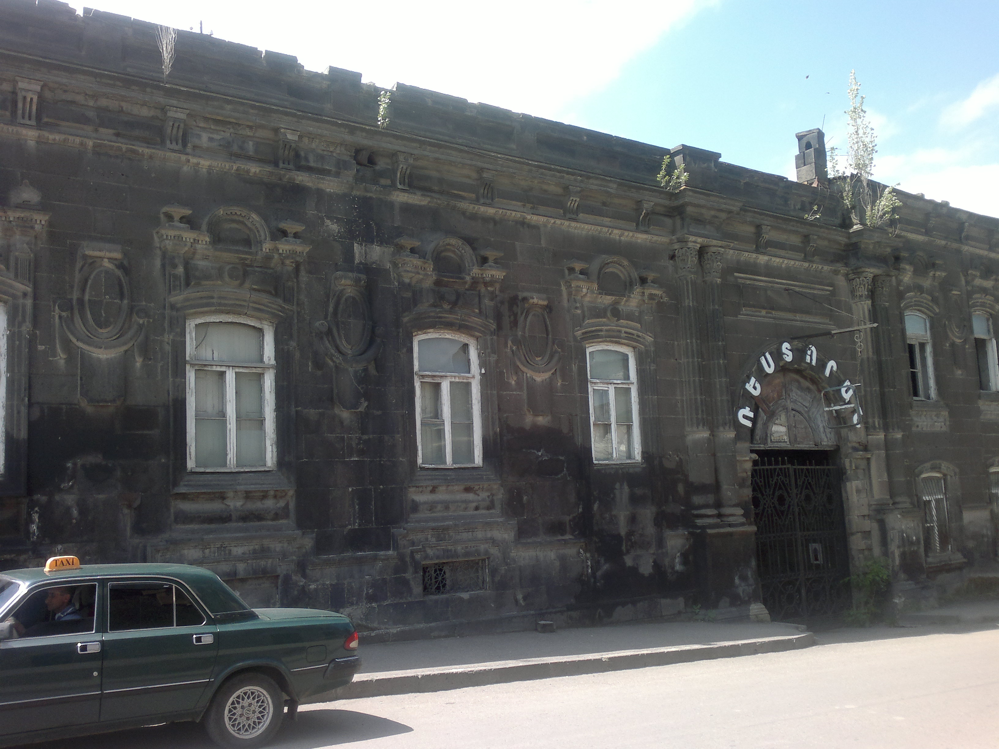 Շենք Գյումրիում 1/4.946